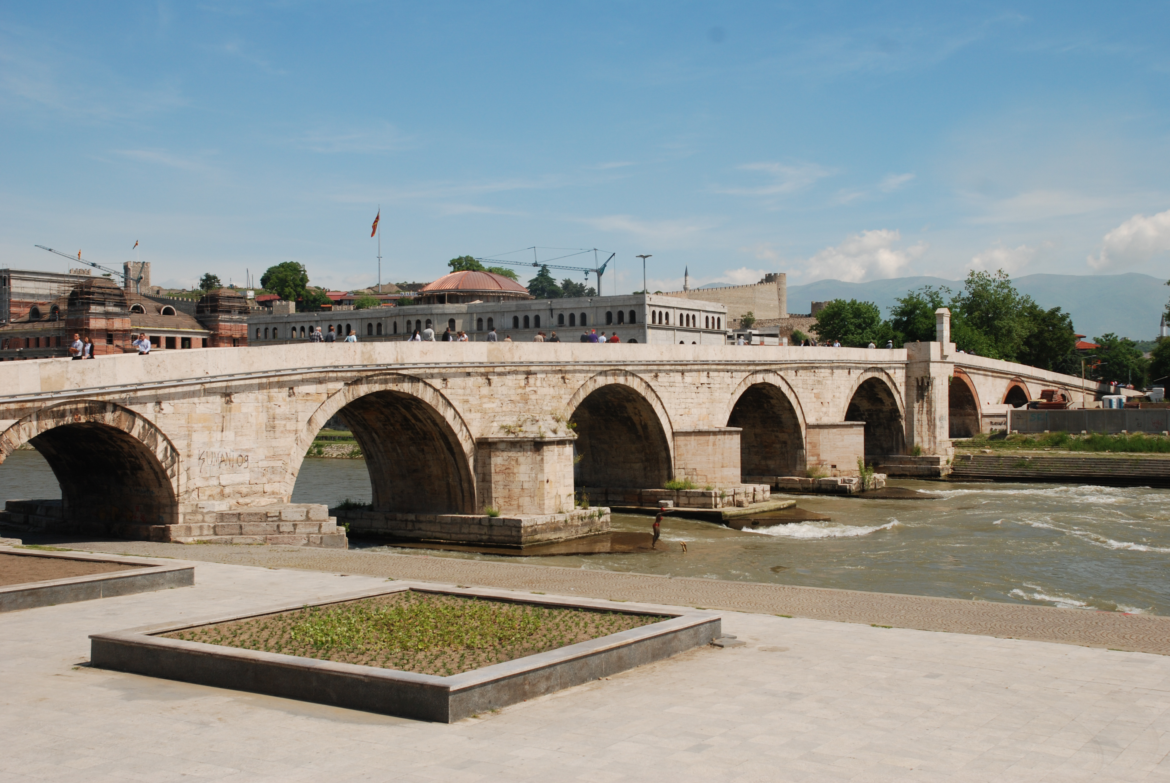 Skopje, Macedonia